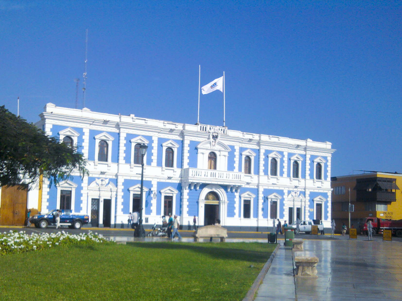 Municipalidad Provincial de Trujillo